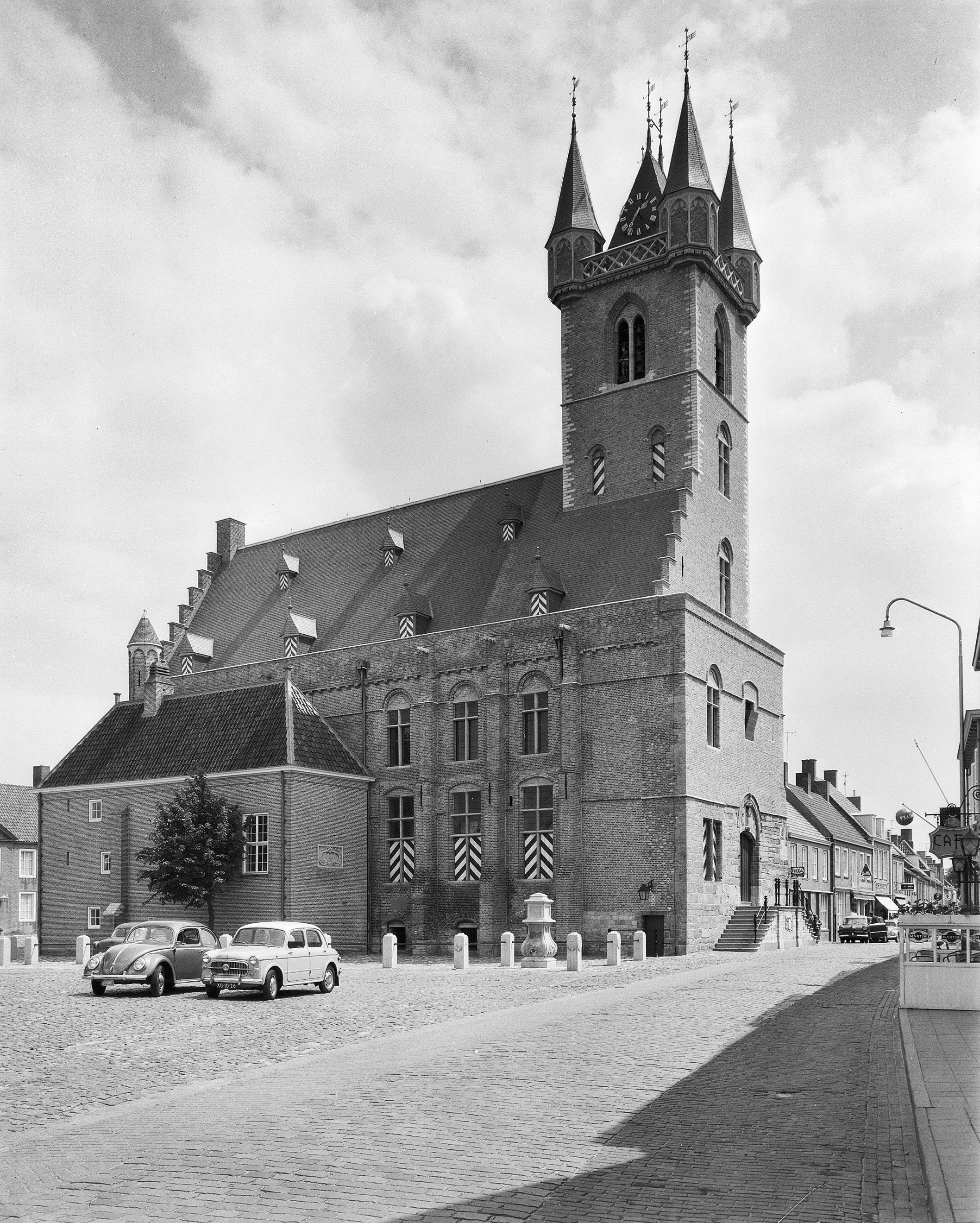 Stadhuis: exterieur overzicht